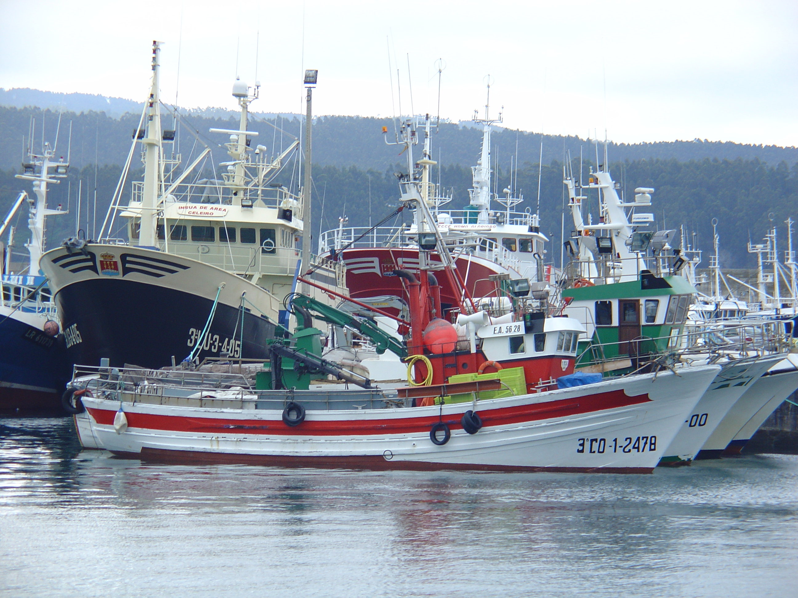 Buque M Presas. Viveiro, Galiza Ficha do Buque Nome do buque Lista Matrícula Folio M. PRESAS 3 CO-1 2478 RBPCAG 1992CO001474 Estado Alta Porto base Ares Caladoiro/Tipo de pesca CALADOIRO NACIONAL CERCO Artes CERCO Ano construción 1972 Data entrada en servizo 06/08/1973 Arqueo TRB 26,81 Arqueo GT 26,80 Eslora total 16.27 M. Eslora PP 15.00 M. Potencia 195.00 CV. Material casco Madeira